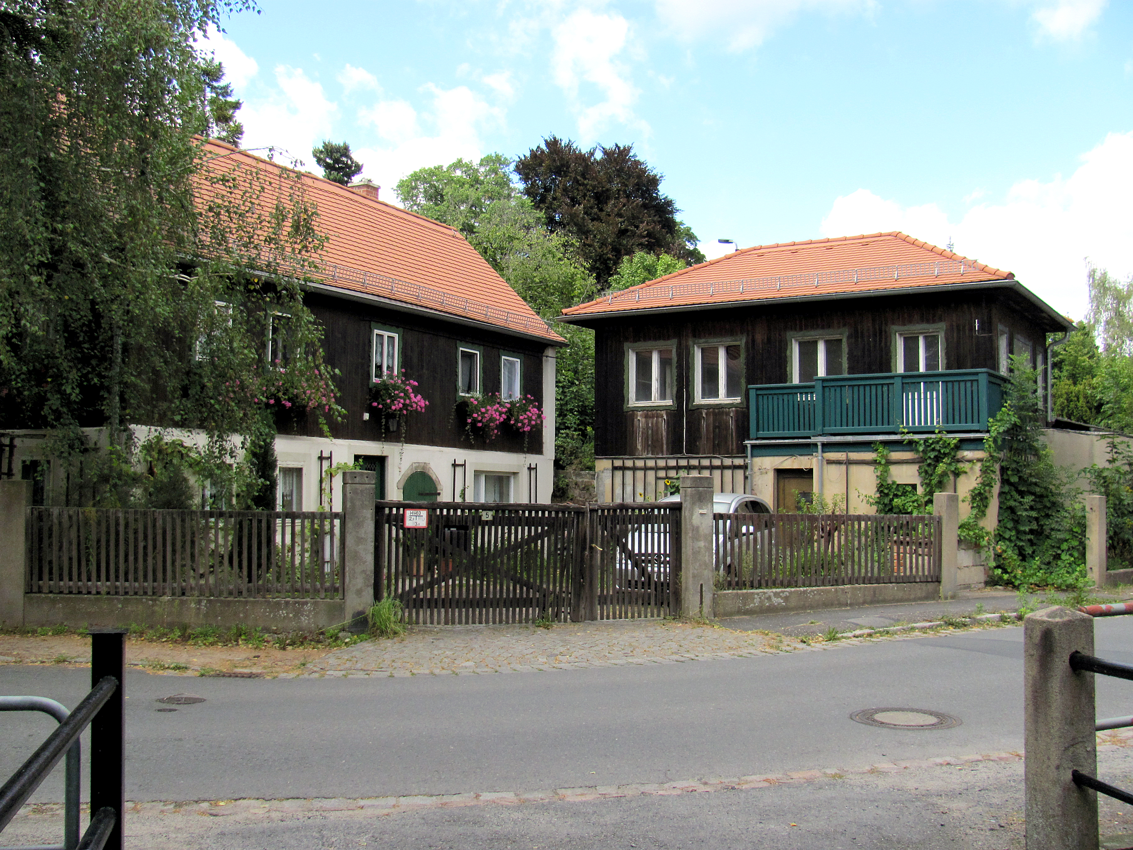 Radebeul, Wohnhaus An der Jägermühle 5